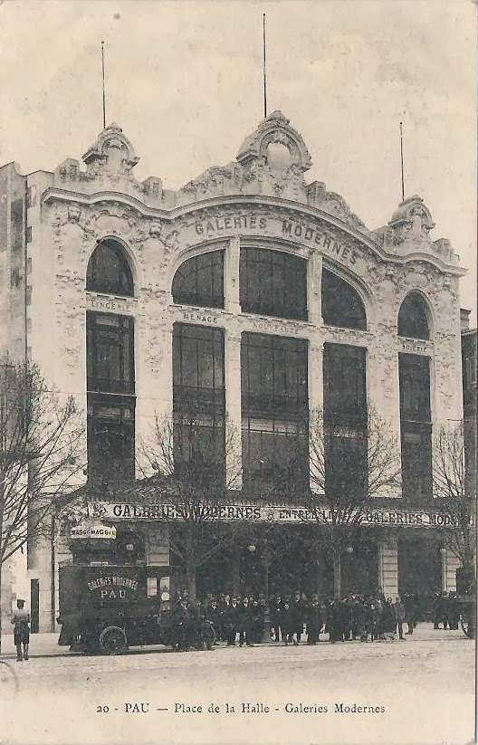 Anciennes Galeries Modernes de Pau